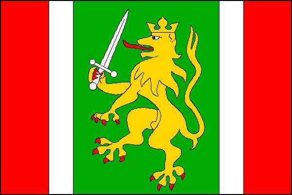 vlajka, Vratěnín, okres Znojmo